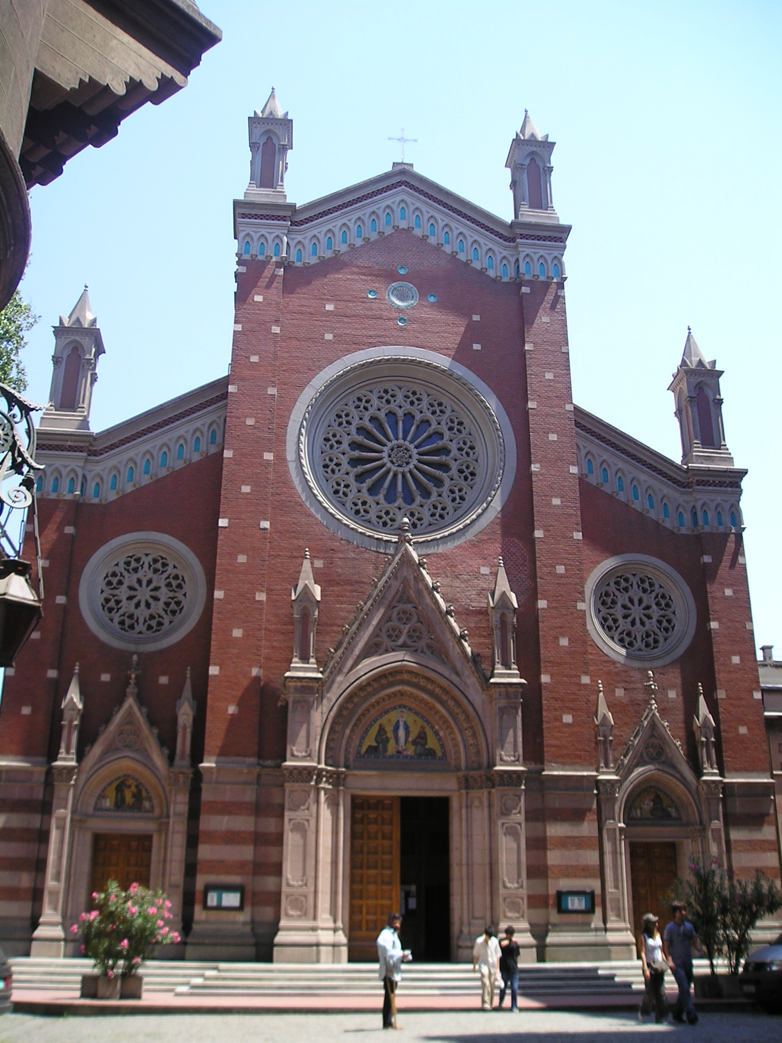 St. Antoine Kerk te Istanbul.